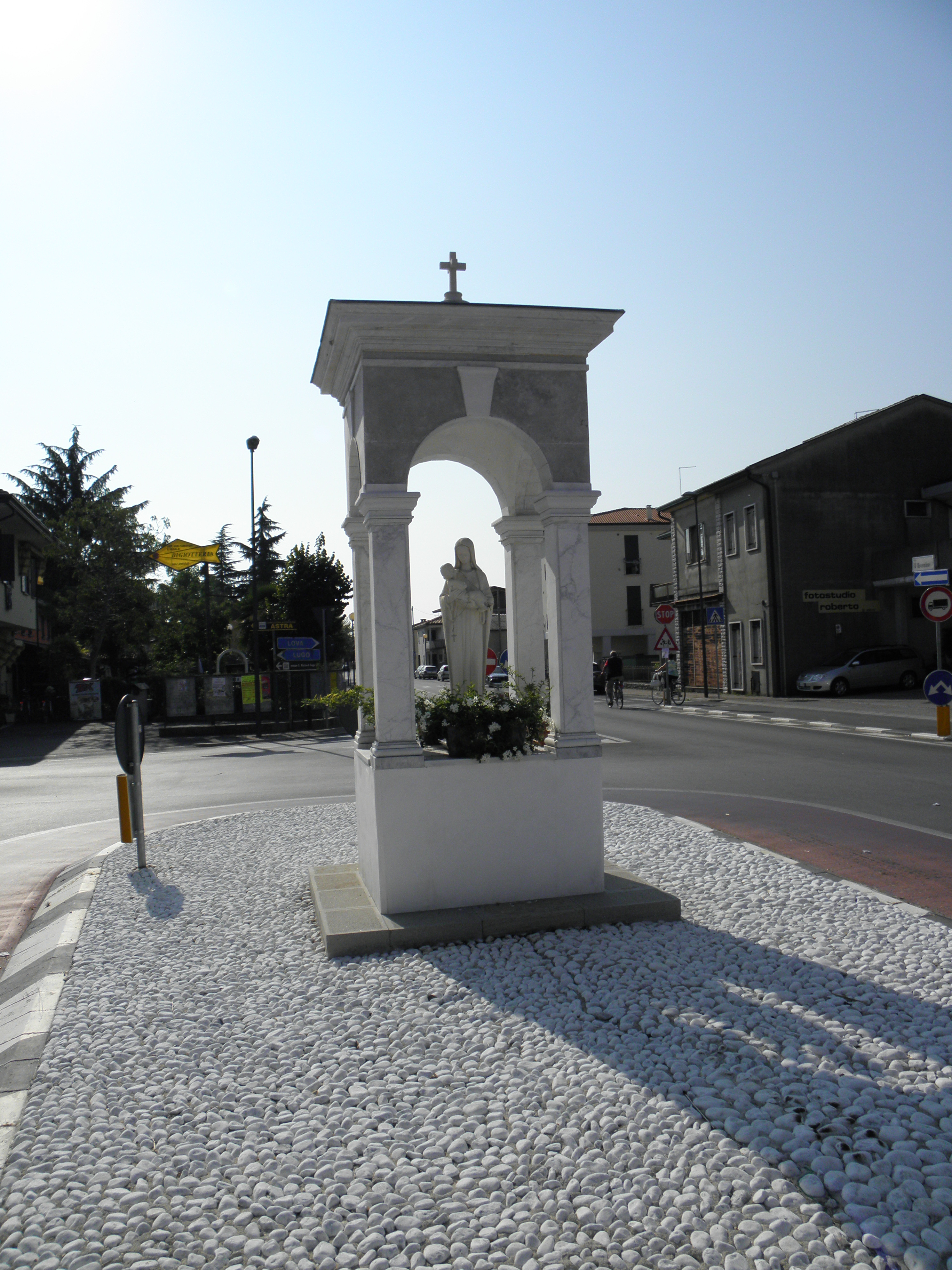 Campagna Lupia: il capitello mariano con all'interno la statua della Madonna col Bambino.